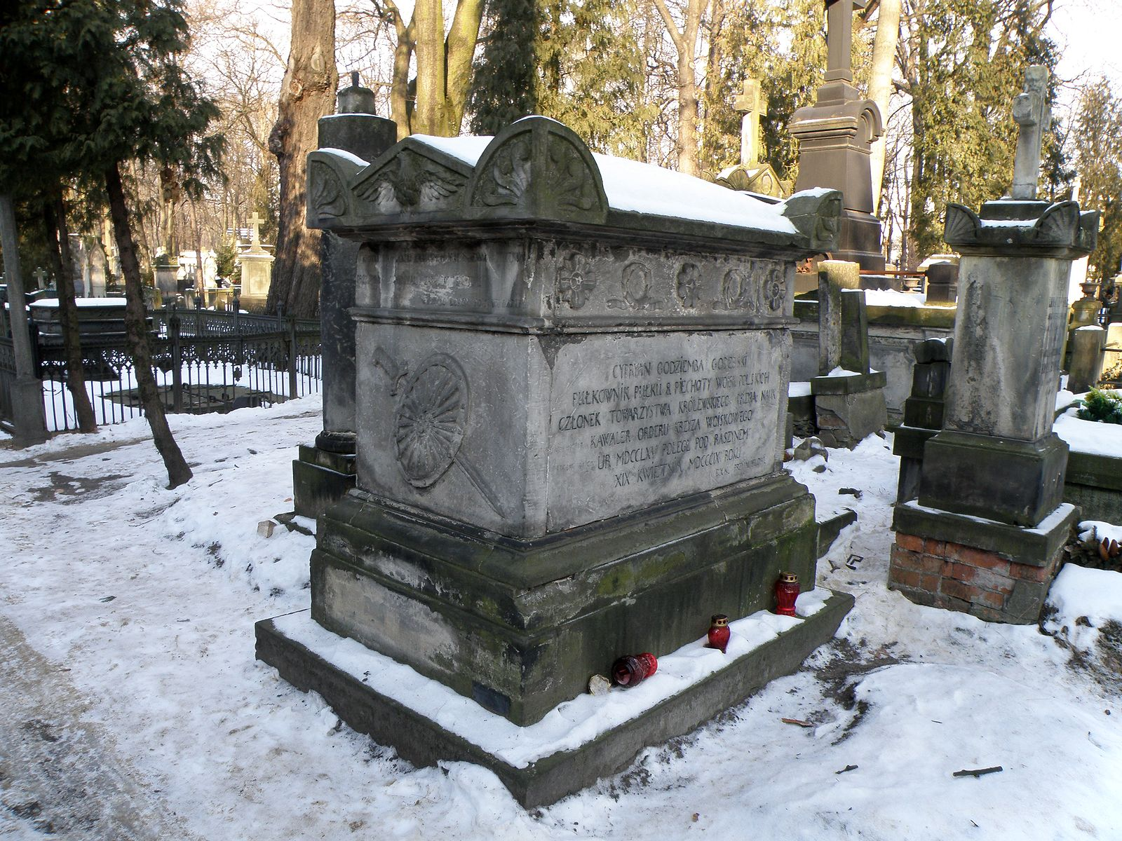 Cyprian Godebski (pisarz), nagrobek na Powązkach